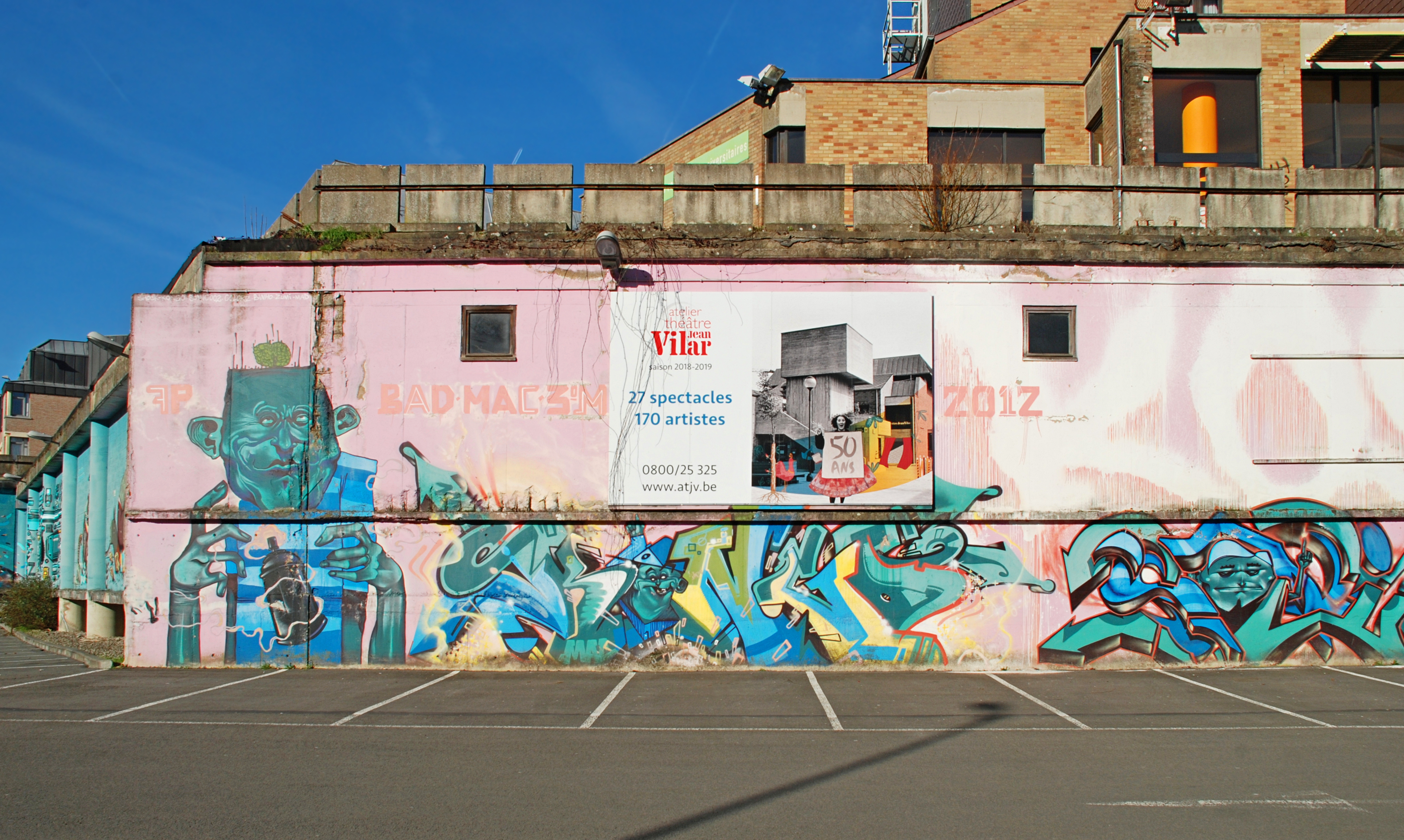 Belgique - Louvain-la-Neuve - Fresque Kosmopolite Art Tour 2012 - Parking du Sablon